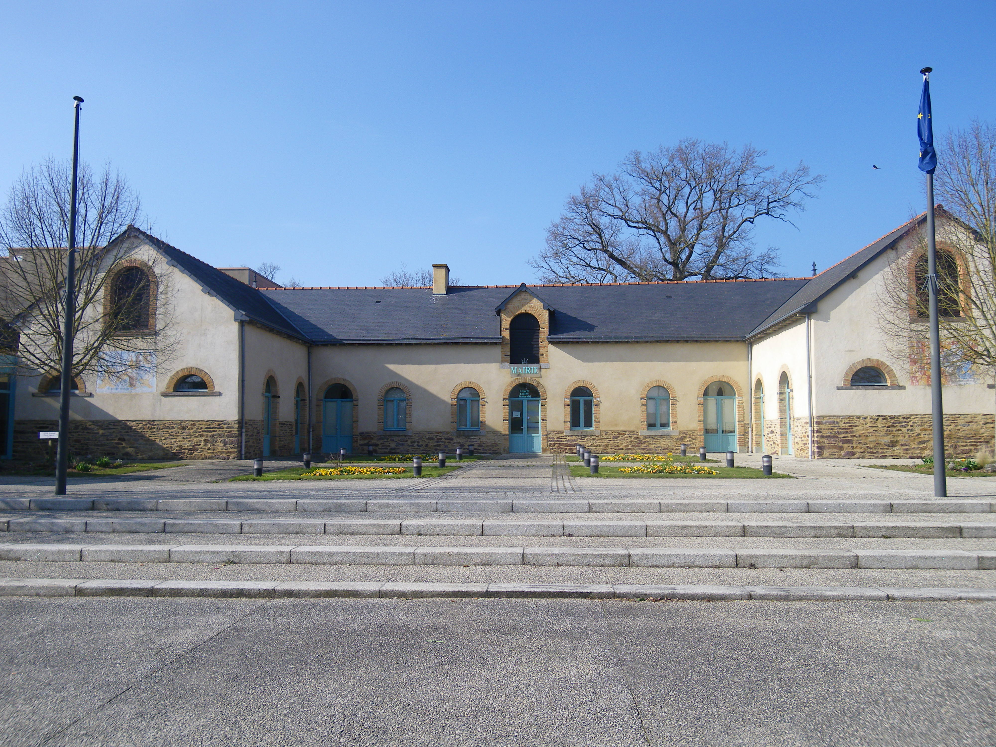 la mairie de thorigné fouillard